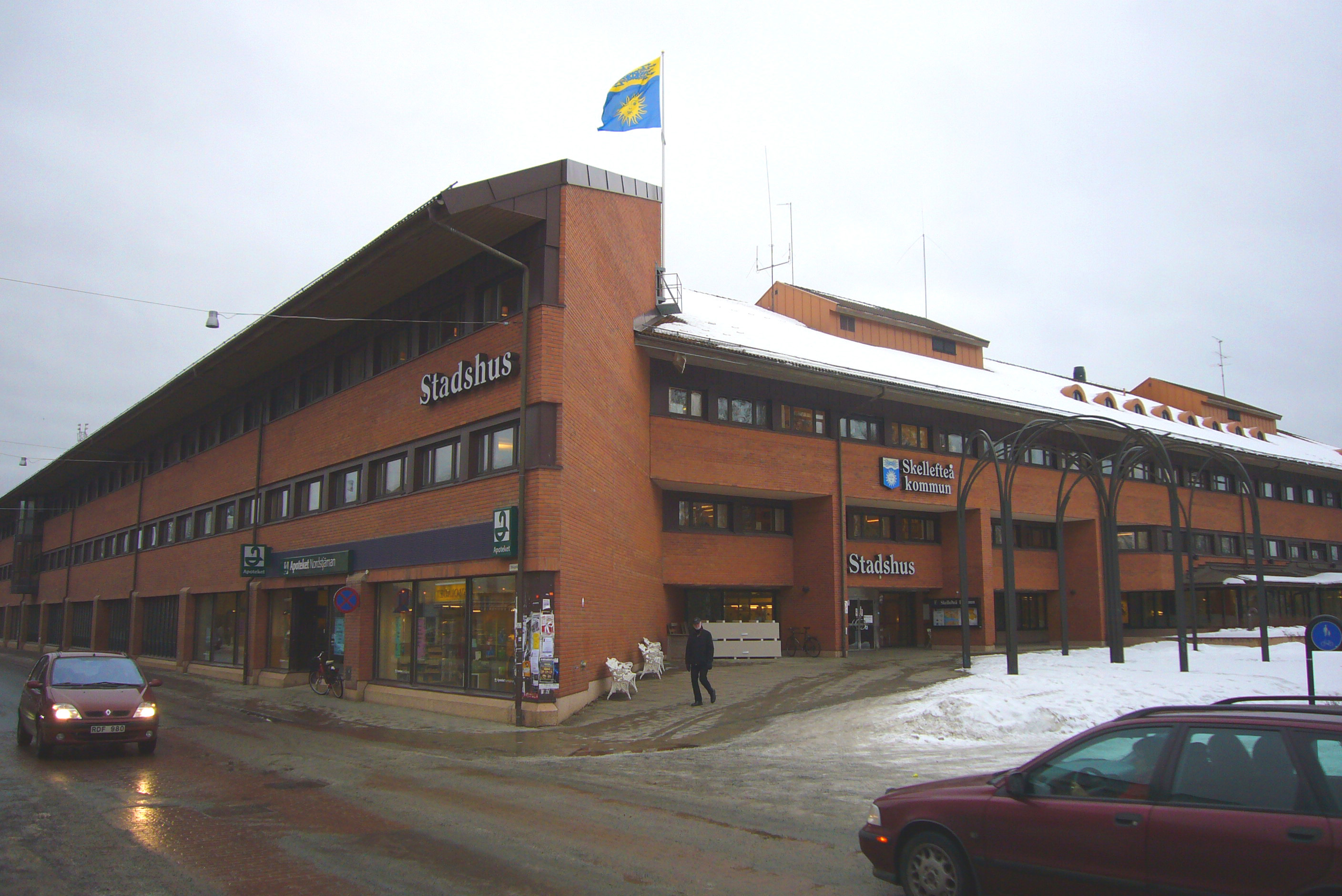 Stadshuset i Skellefteå (sedan 1993), dessförinnan förvaltningshuset Brinken